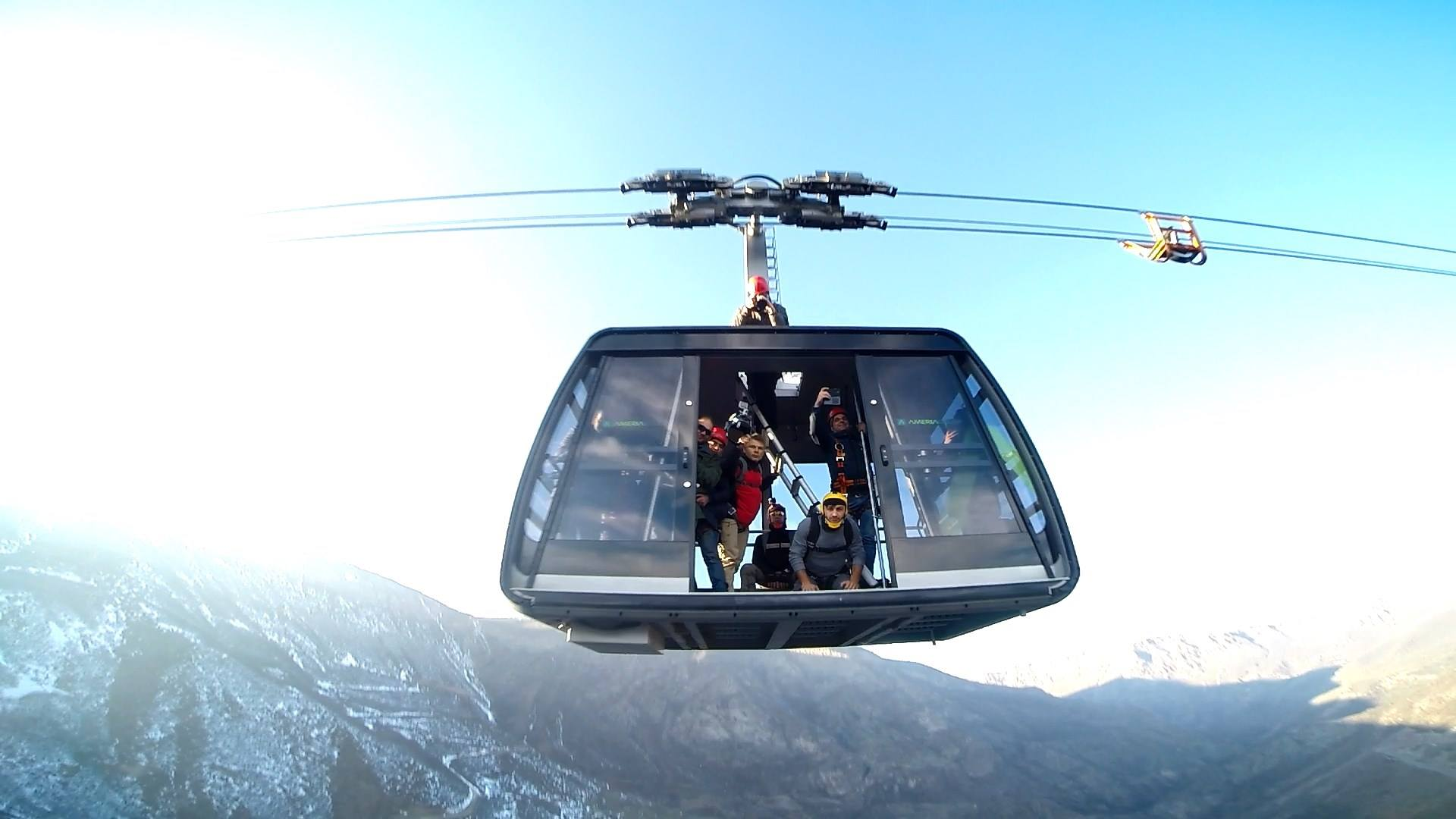 BASE прыжки из кабинки канатной дороги